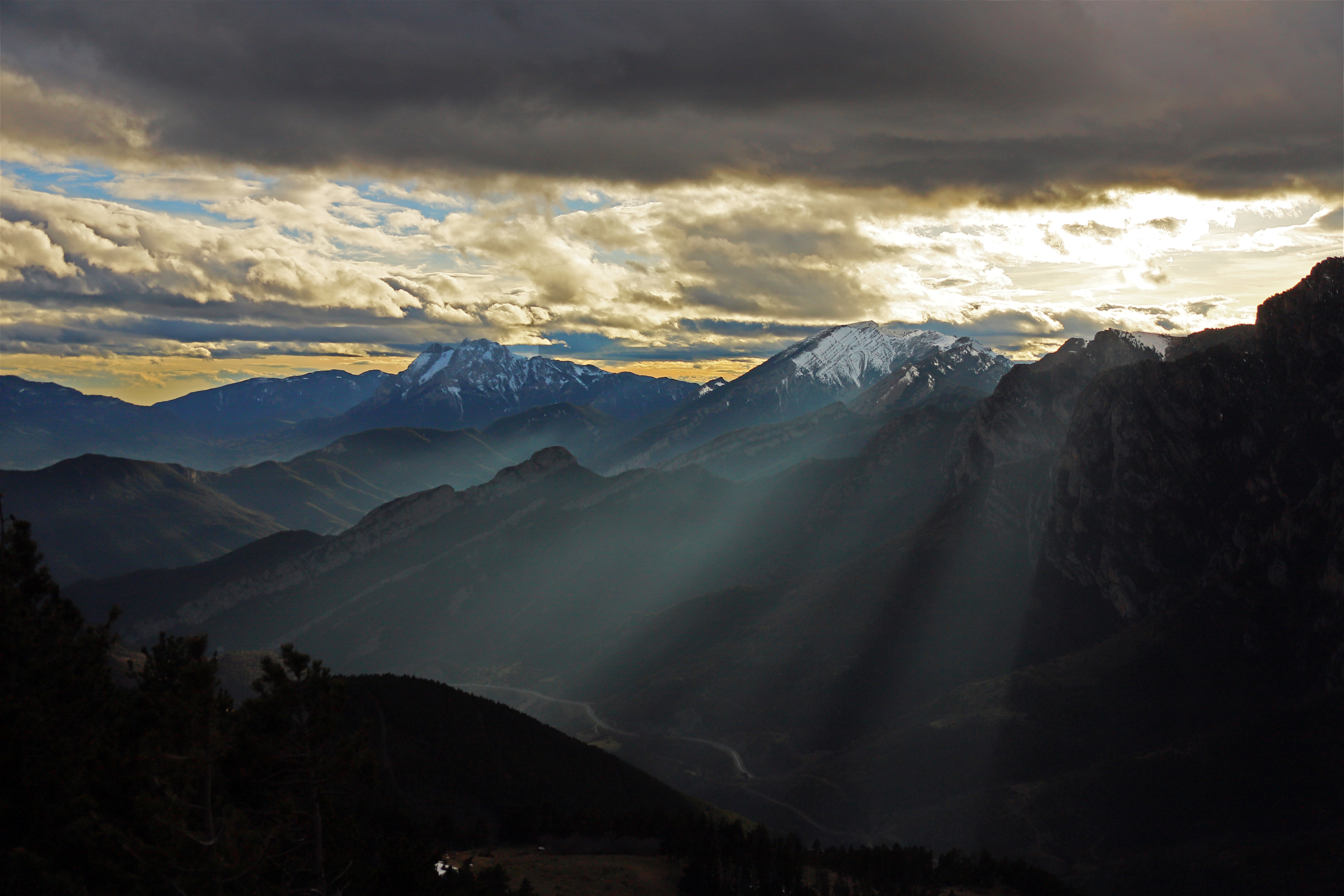 Prepirineu Central català This is a photography of a Special Area of Conservation in Spain with the ID: ES0000018. Natura2000 entry, EEA entry